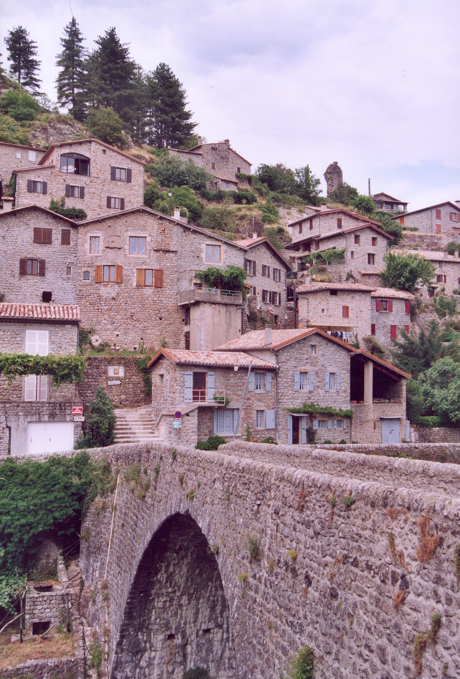 France Ardèche Jaujac Photographie prise par GIRAUD Patrick